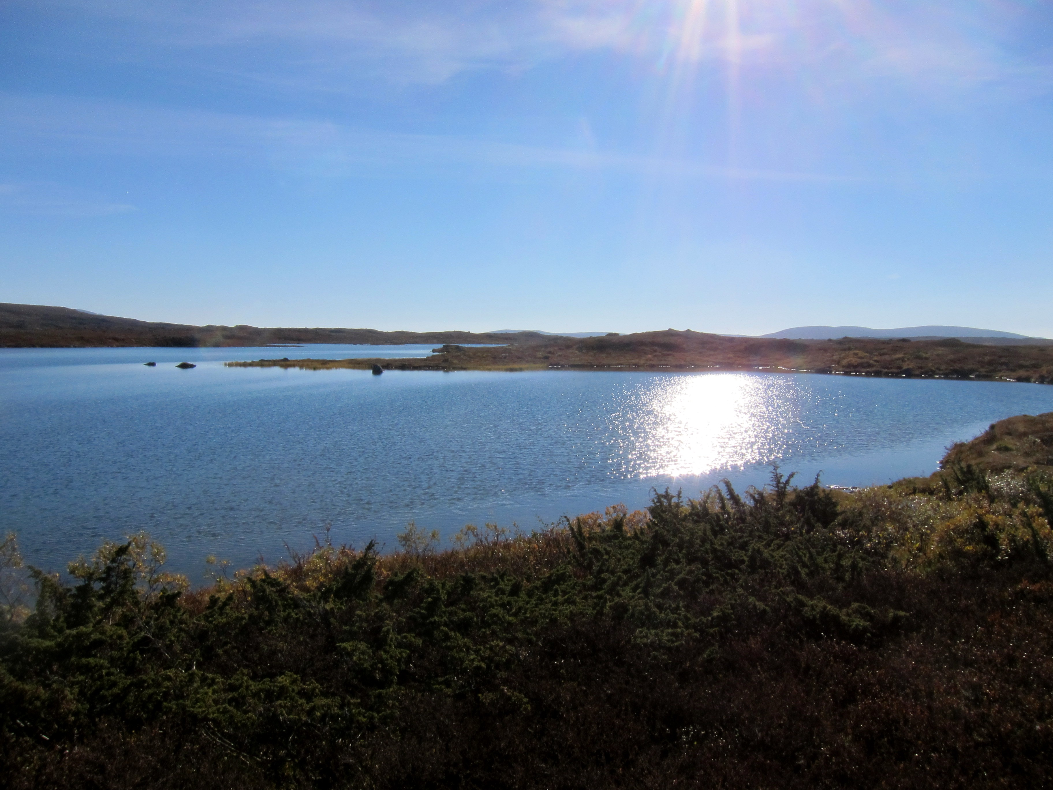 Krustjärnen, Härjedalen during late summer, 2014